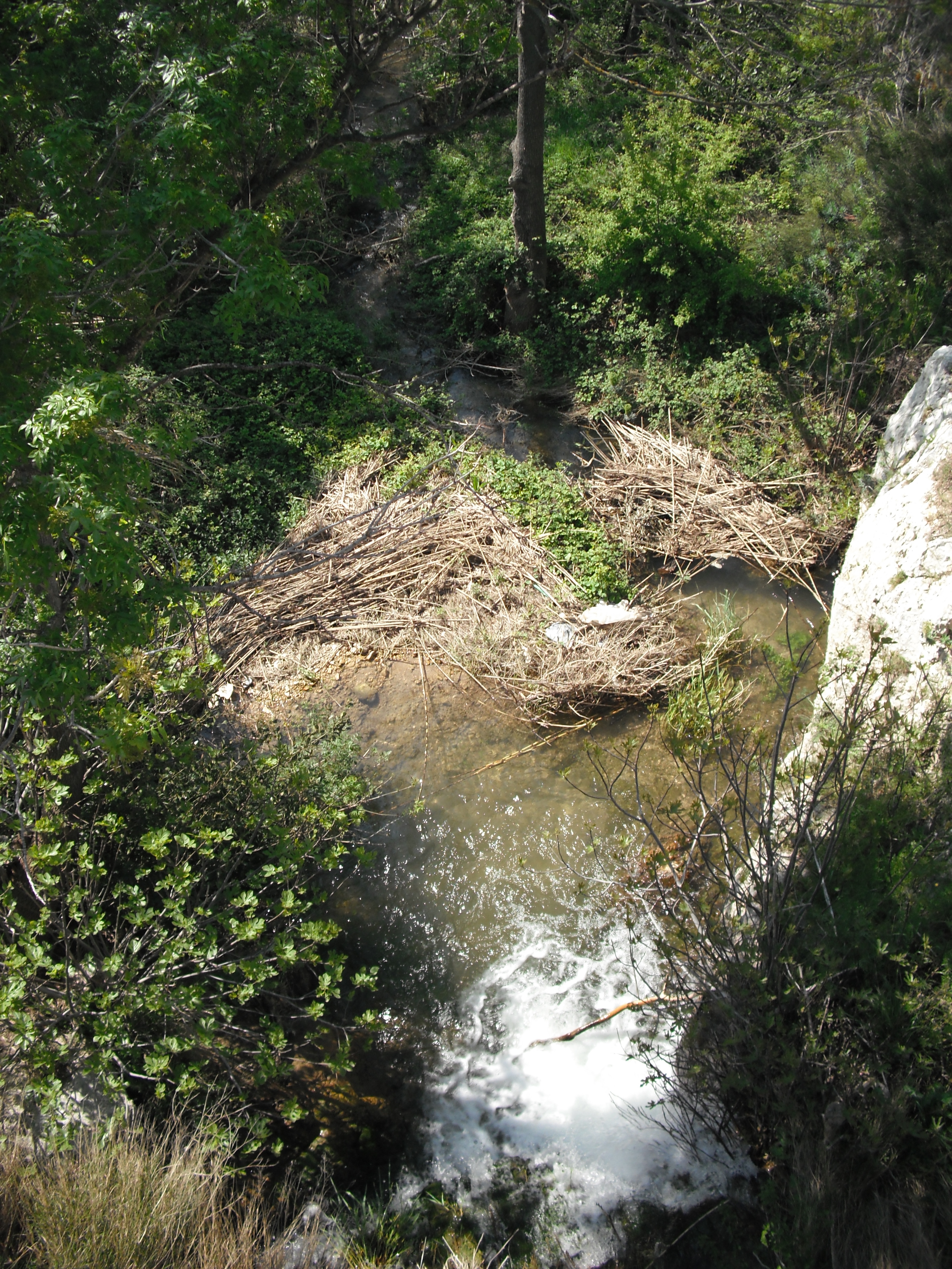 Gaudre de la Foux. Photographie prise depuis le canal de la vallée des Baux, quartier des rochers d'Entreconque, commune de Maussane-les-Alpilles (13)